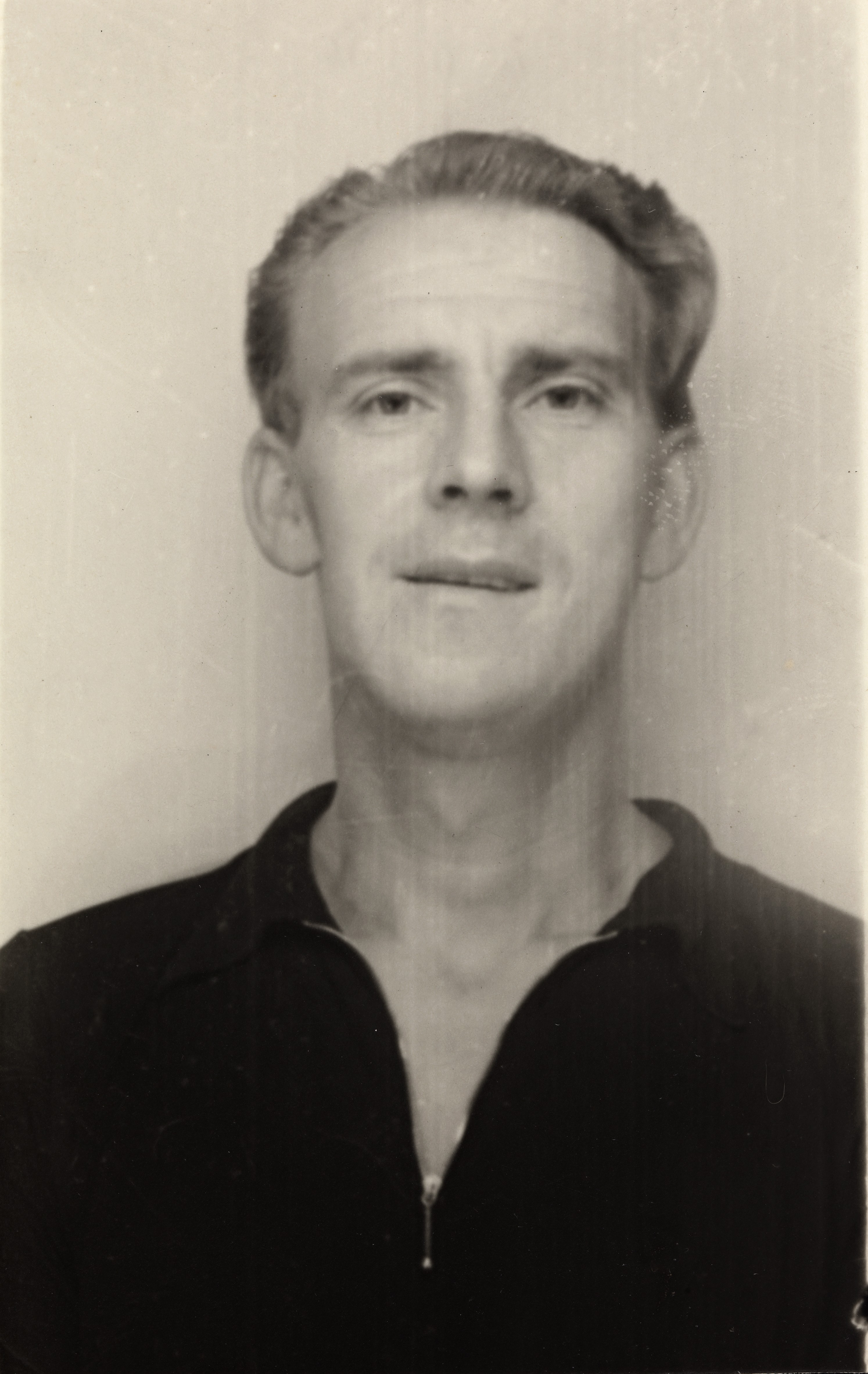 Beskrivelse / Description: Alf Prøysen var forfatter og visesanger. Dato / Date: ukjent / unknown Fotograf / Photographer: ukjent / unknown Digital kopi av original / Digital copy of original: s/h papirpositiv Eier / Owner Institution: Nasjonalbiblioteket / National Library of Norway Lenke / Link: Bildesignatur / Image Number: blds_06254